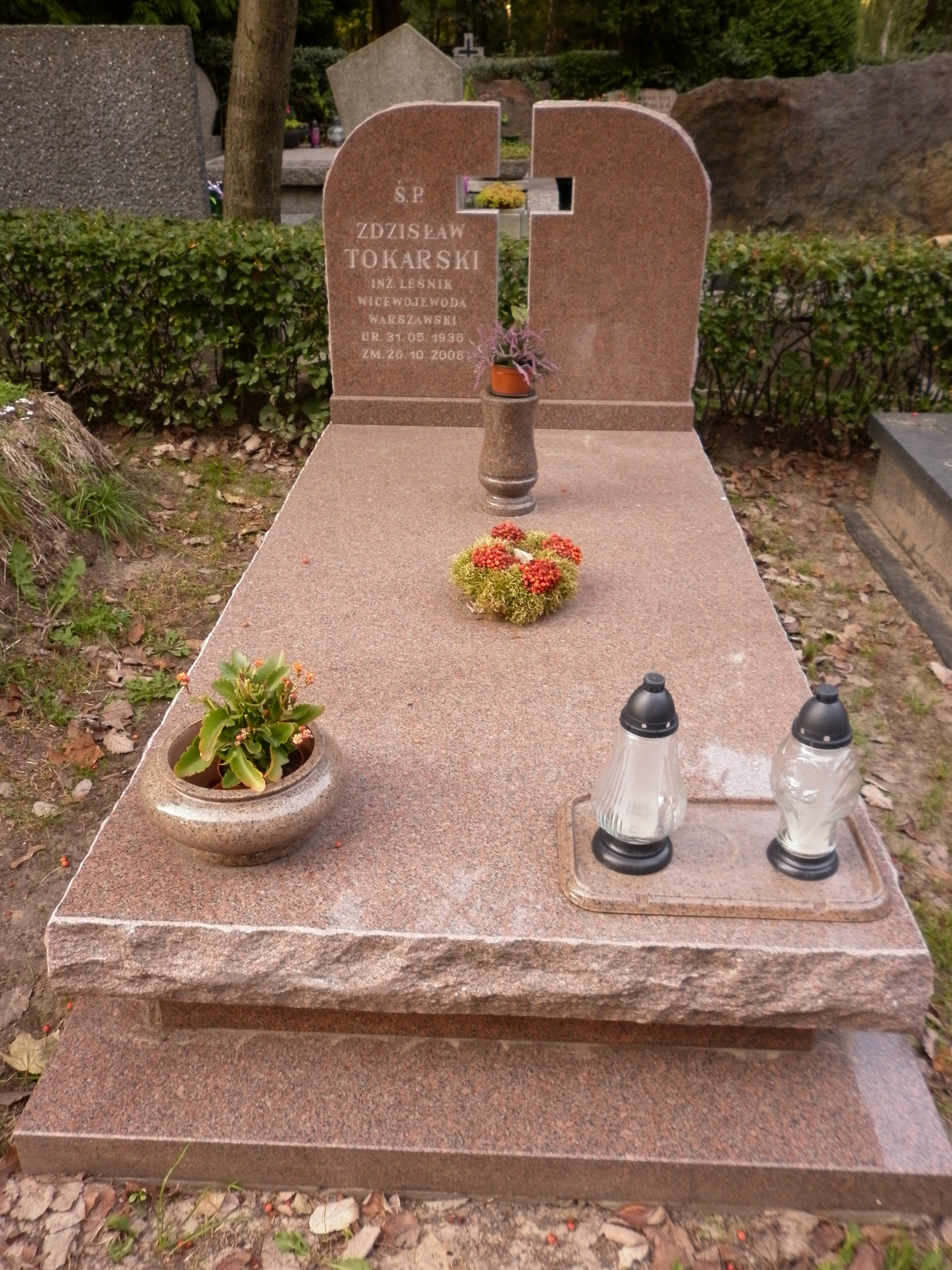 Grób Zdzisława Tokarskiego na Wojskowych Powązkach